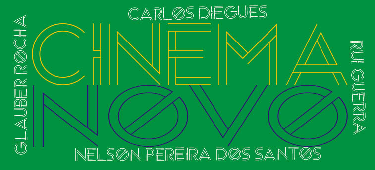 Imagen del cinema novo